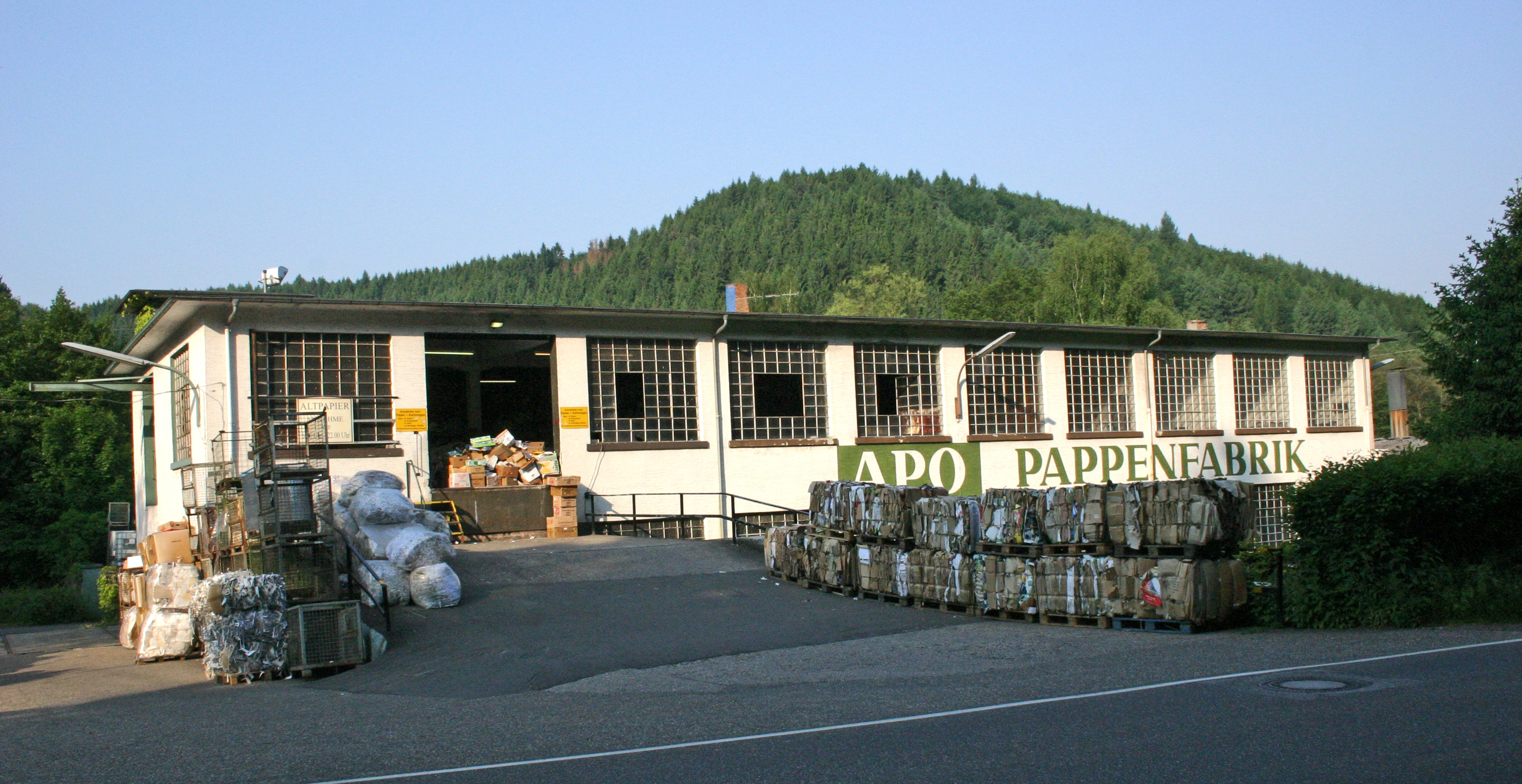 Rodalben